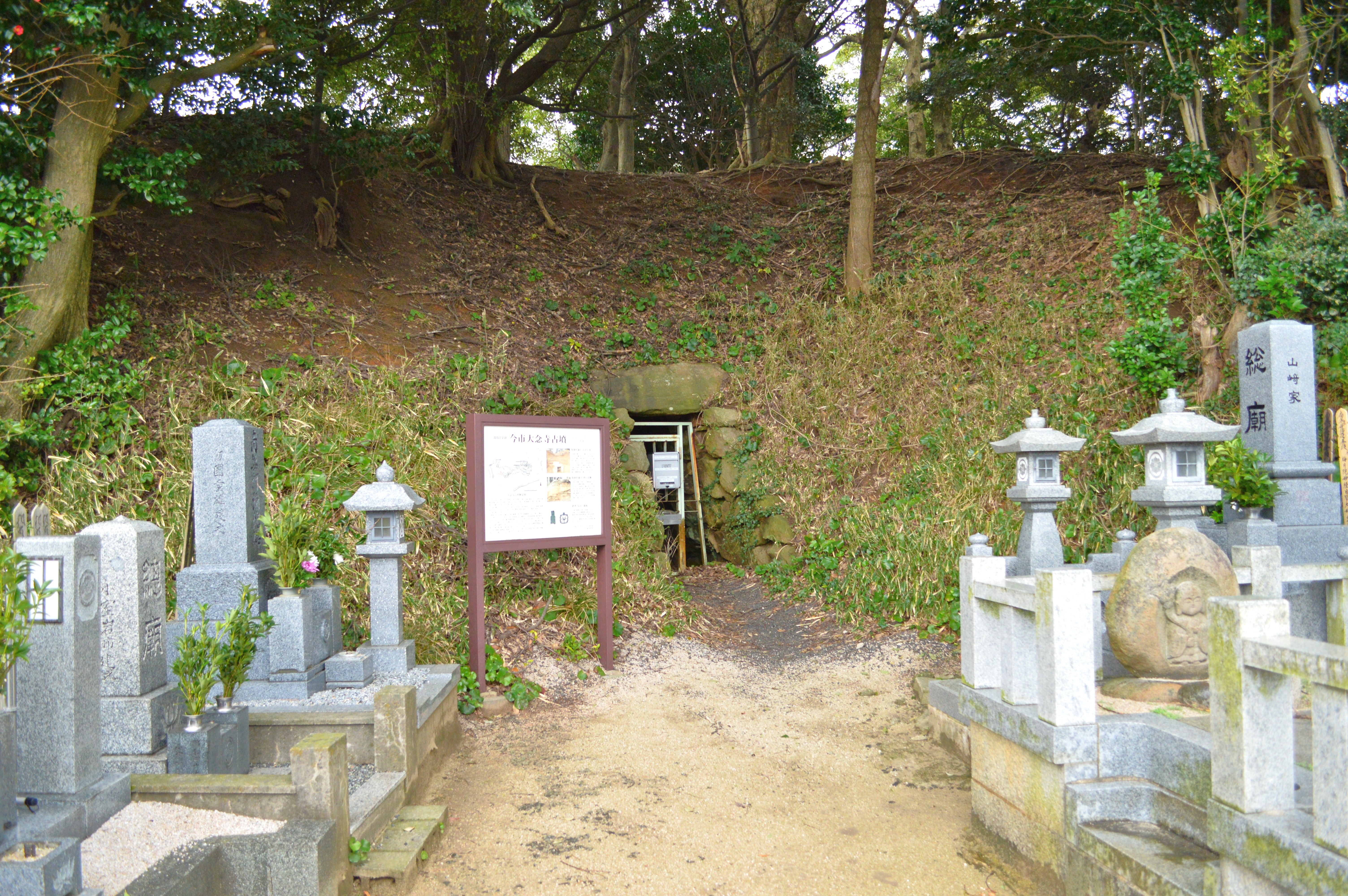 今市大念寺古墳 石室入り口